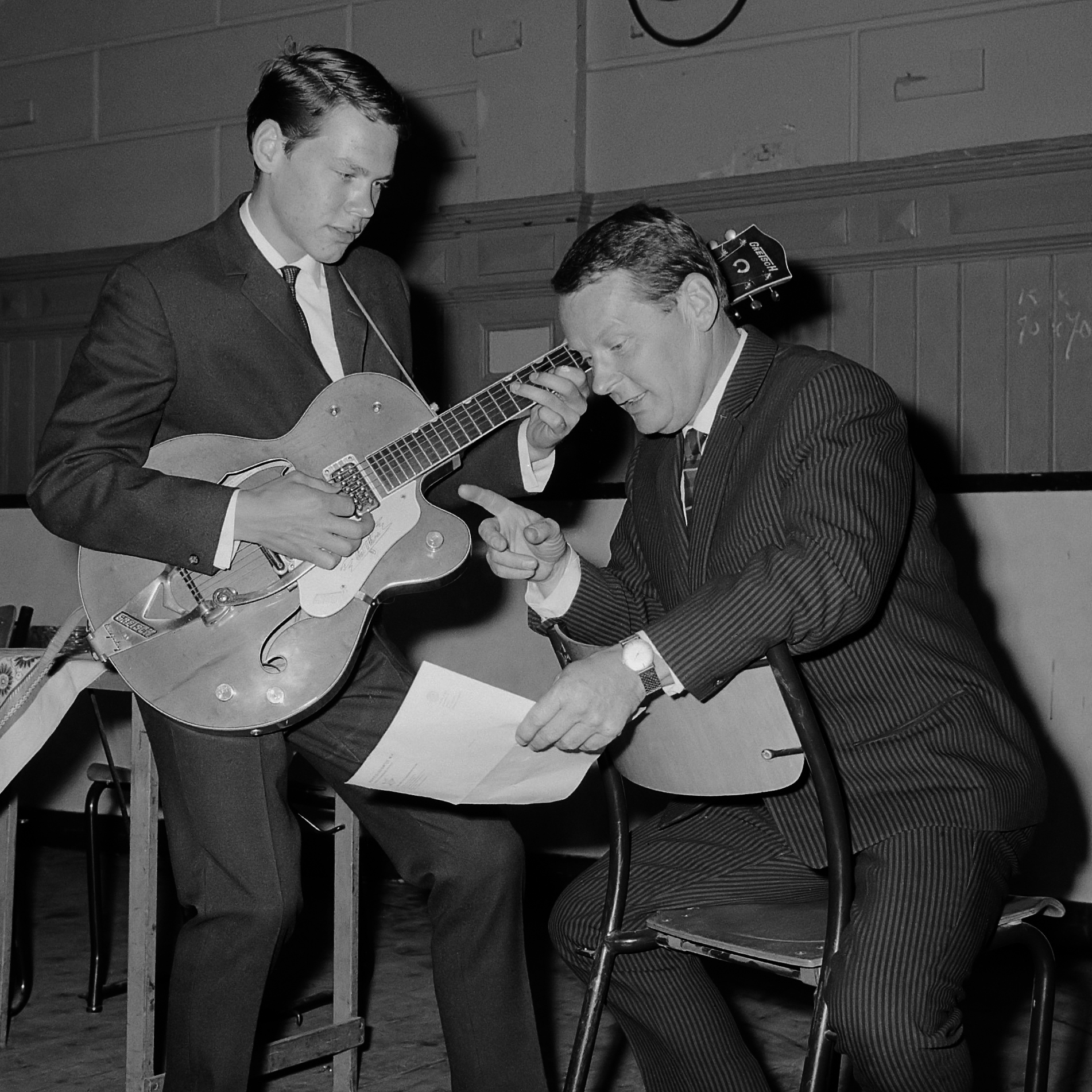 "Samen uit" nieuwe Snip en Snap revue, Jerry Rix (Geertjan Lacunes) en Toby Rix (Tobias Lacunes) 15 juni 1964